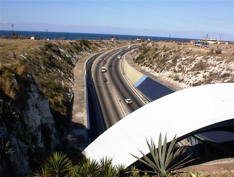 Tunel de la Bahia en Ciudad de la Habana